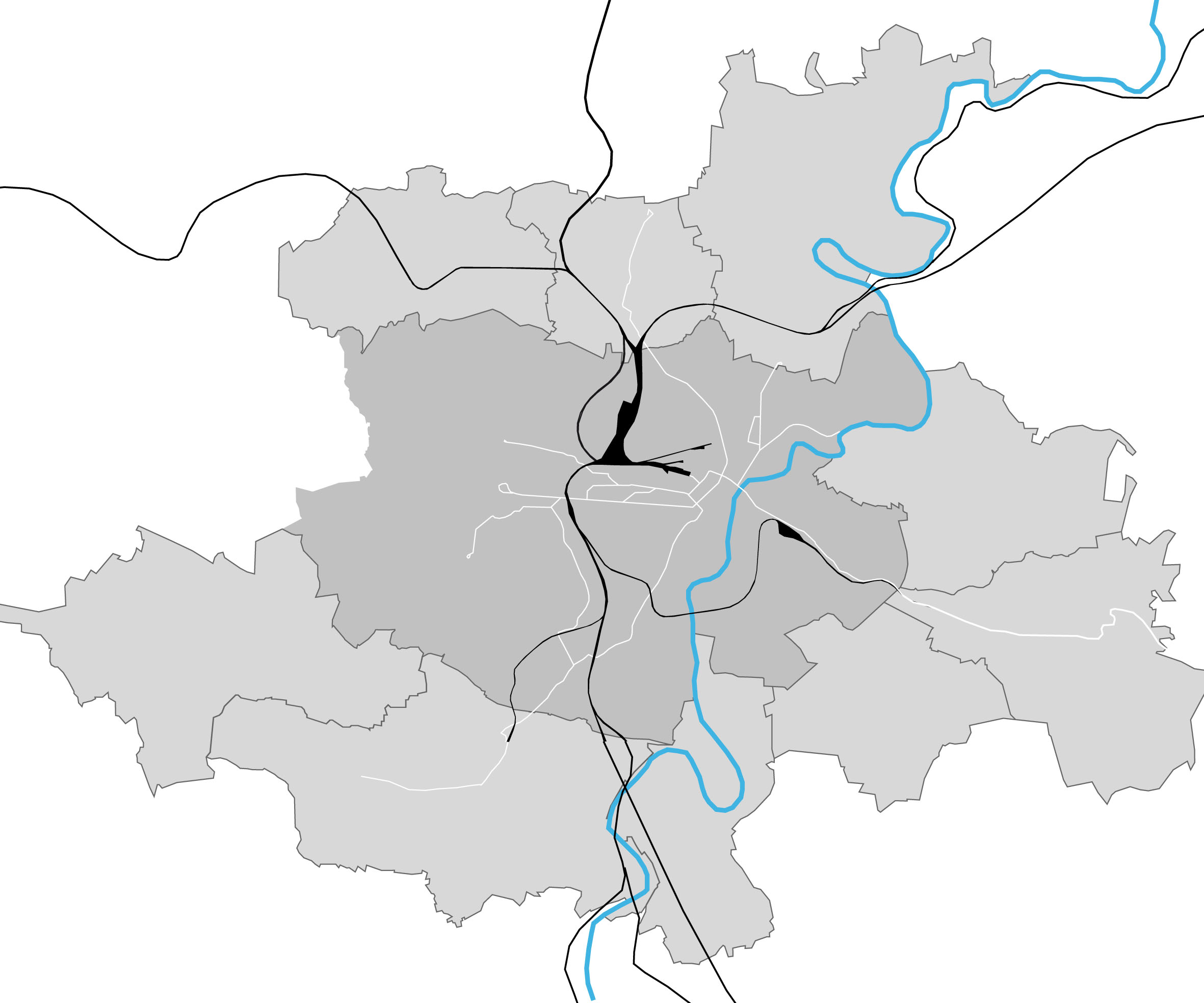 DB-Fernverkehr und SPNV in Kassel